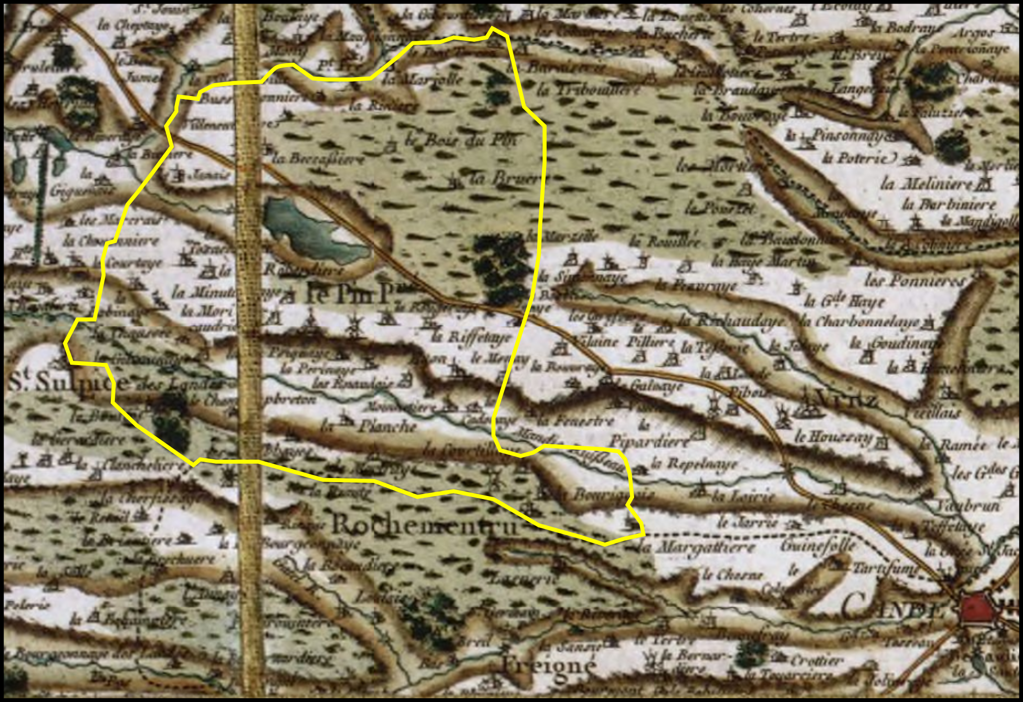 Le Pin (Loire-Atlantique) sur la carte de Cassini.